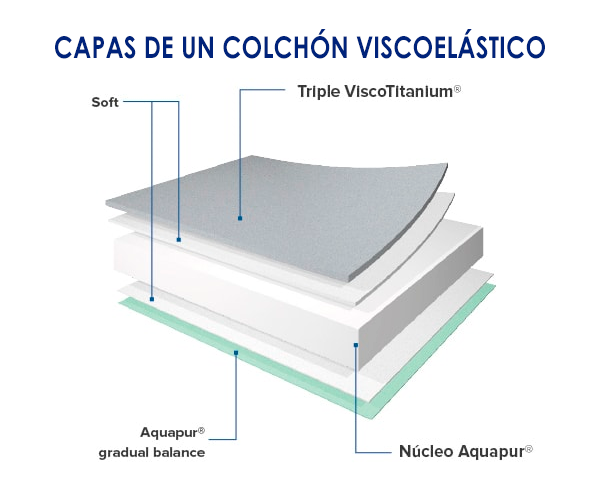 Las capas que componen un colchón viscoelástico incluyen distintos materiales.